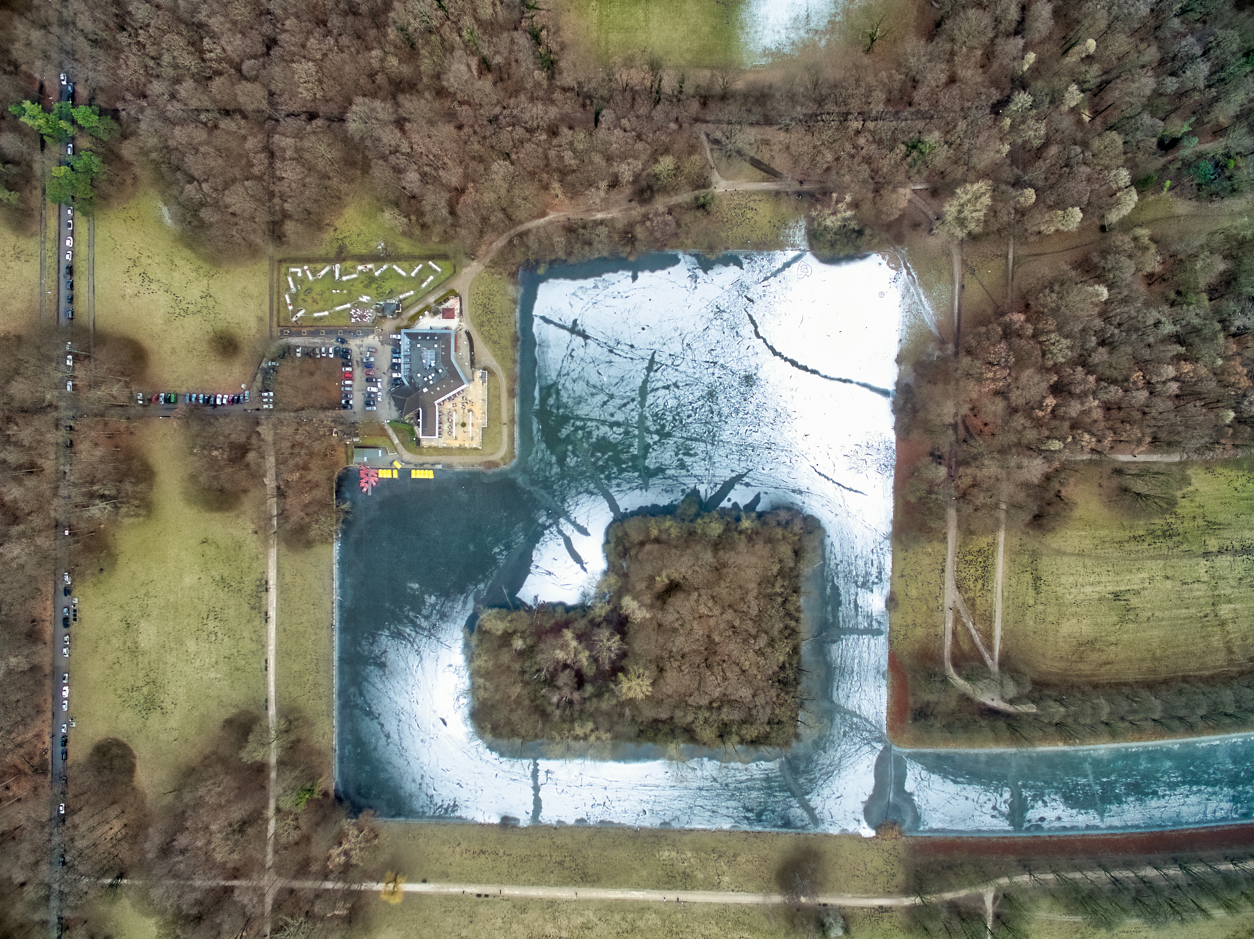 Cologne